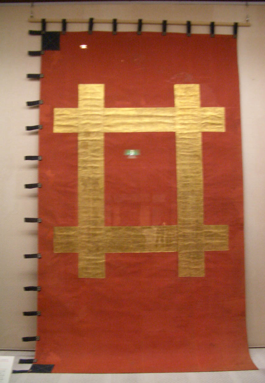 井伊家の旗印